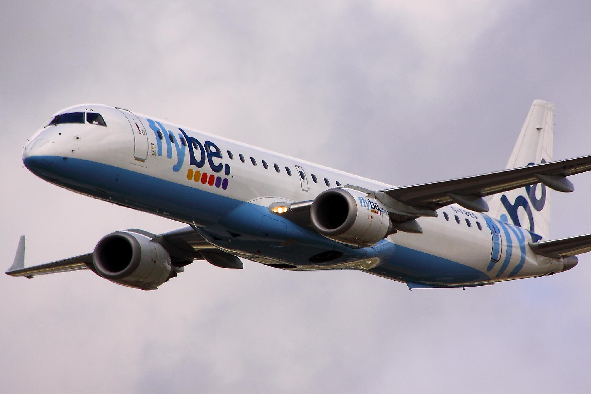 Embraer 195 - RIAT 2011